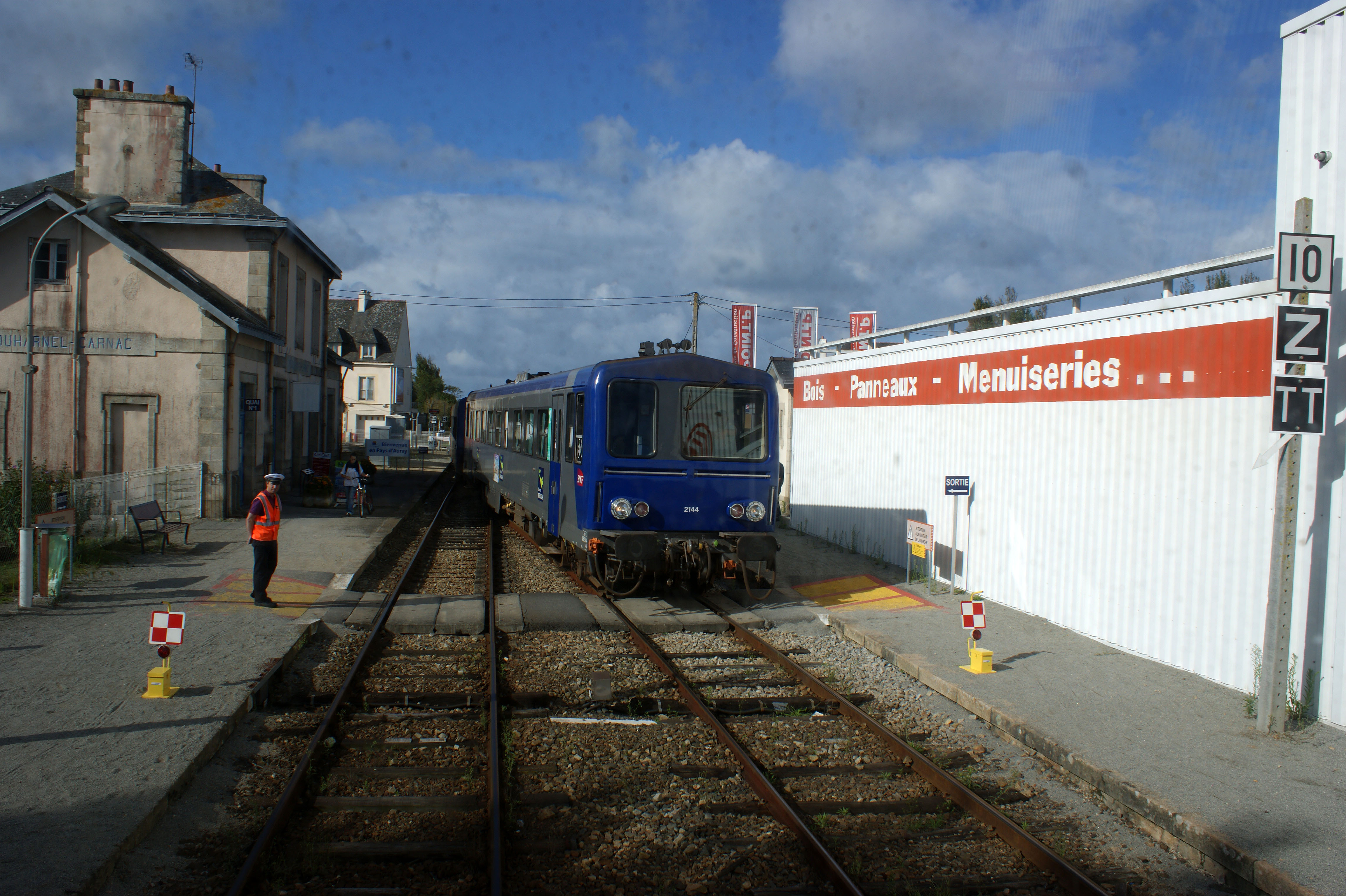 Gare de Plouharnel - Carnac croisement du Tire bouchon.